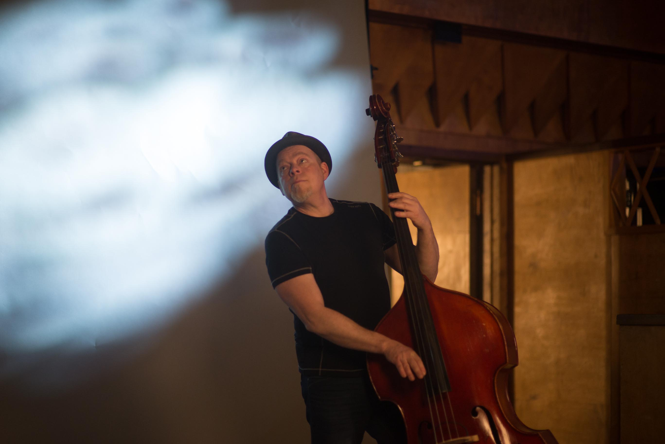 Sven Zimmermann am Kontrabass